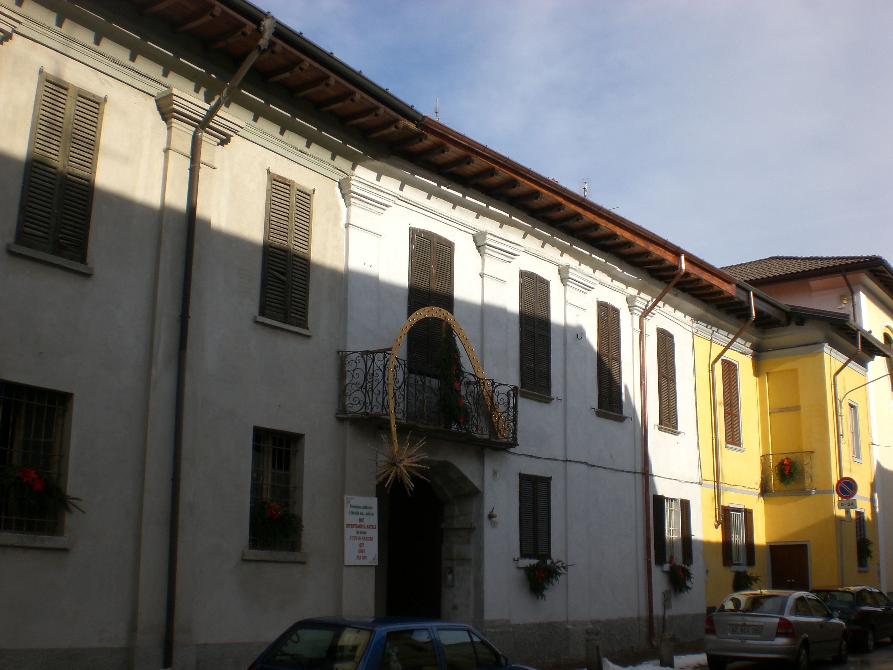 Villa Rasini (Borsano, Busto Arsizio)